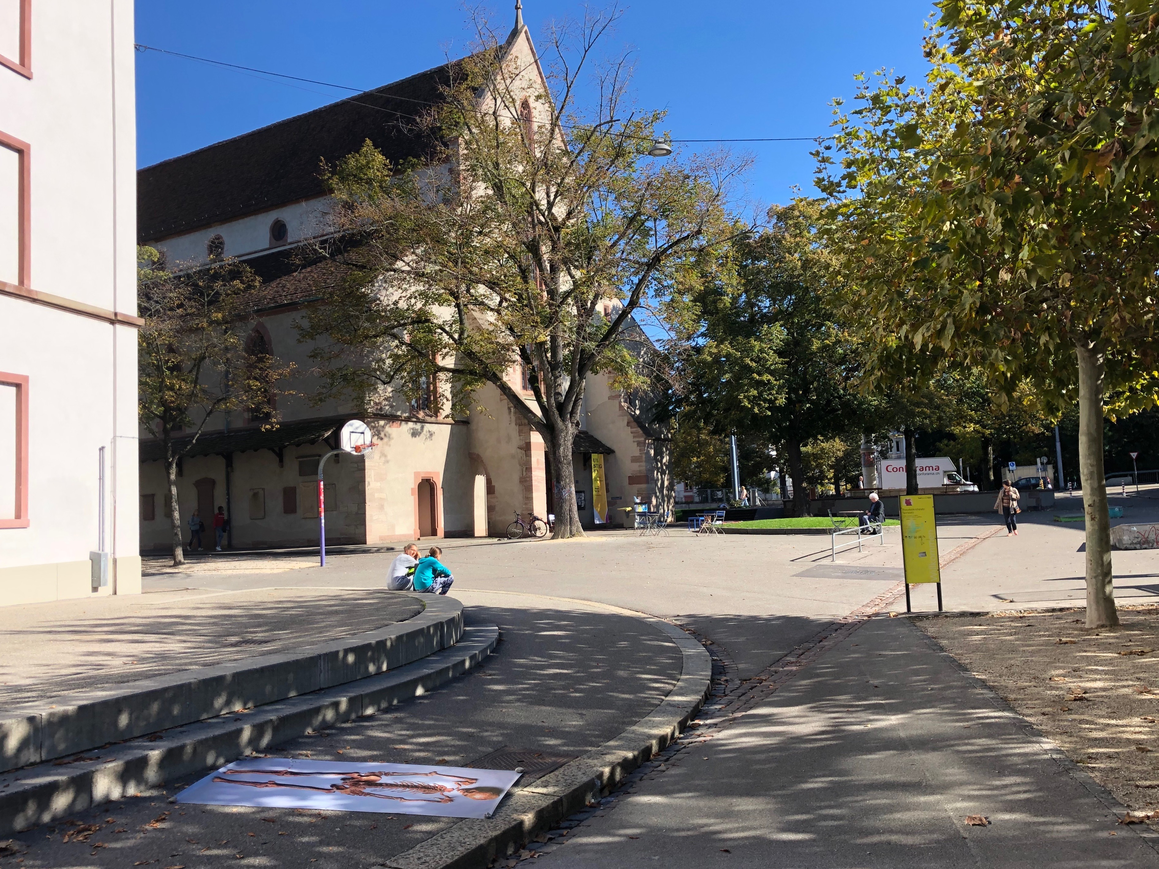 Theo der Pfeifenraucher Fundort neben der Theodorskirche, Basel